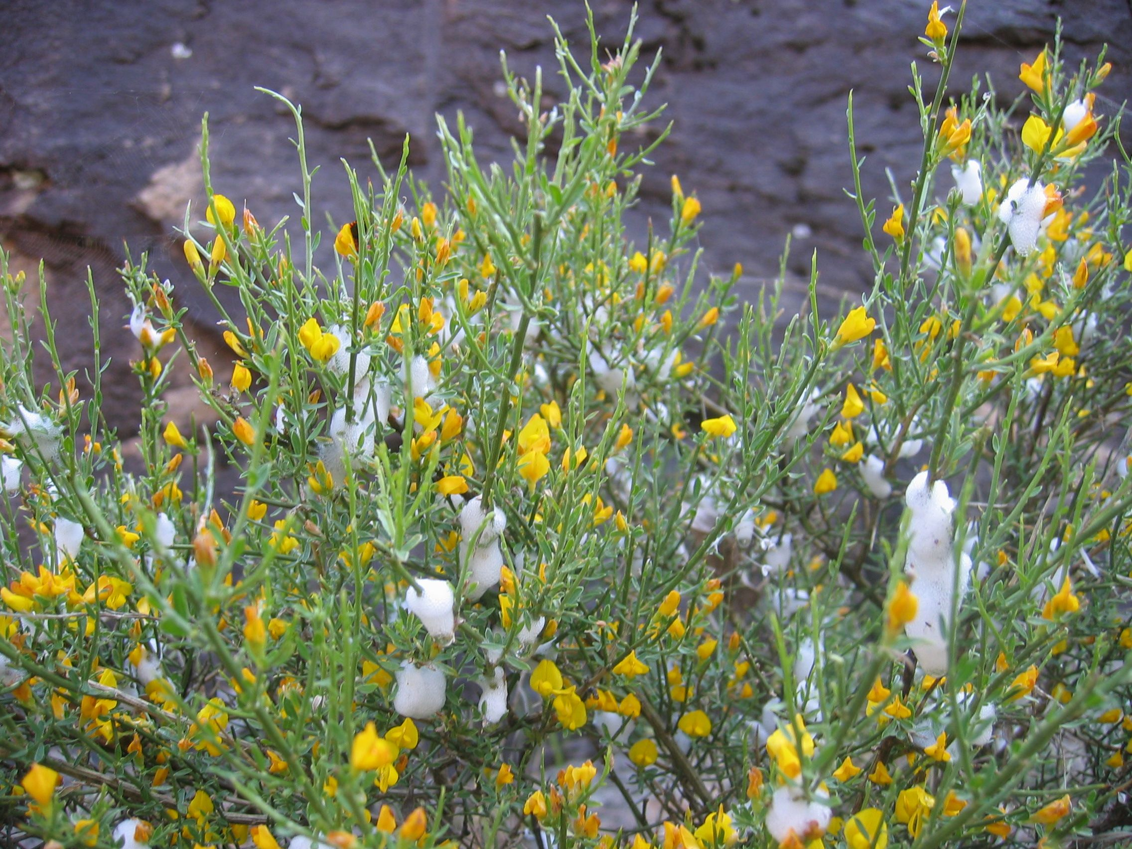 Genista salzmannii Forest of Bonifatu, Corse, France